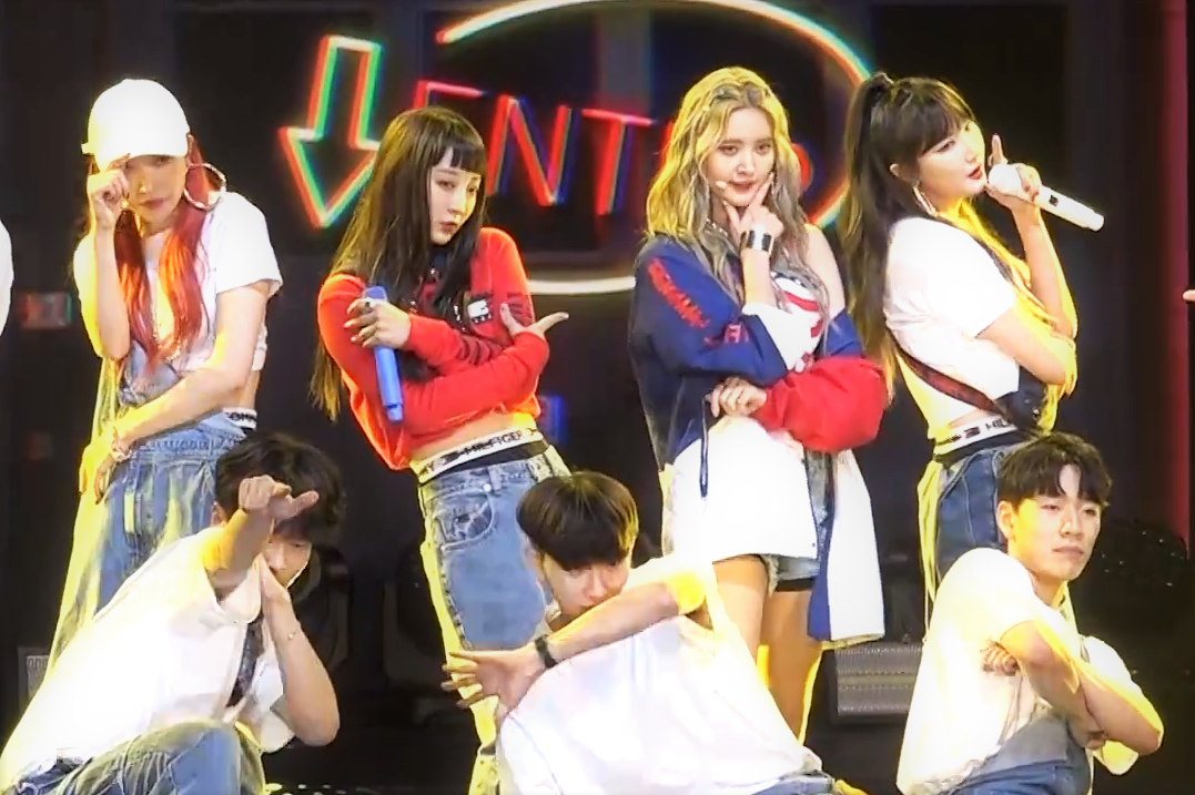 EXID 내일해 쇼케이스